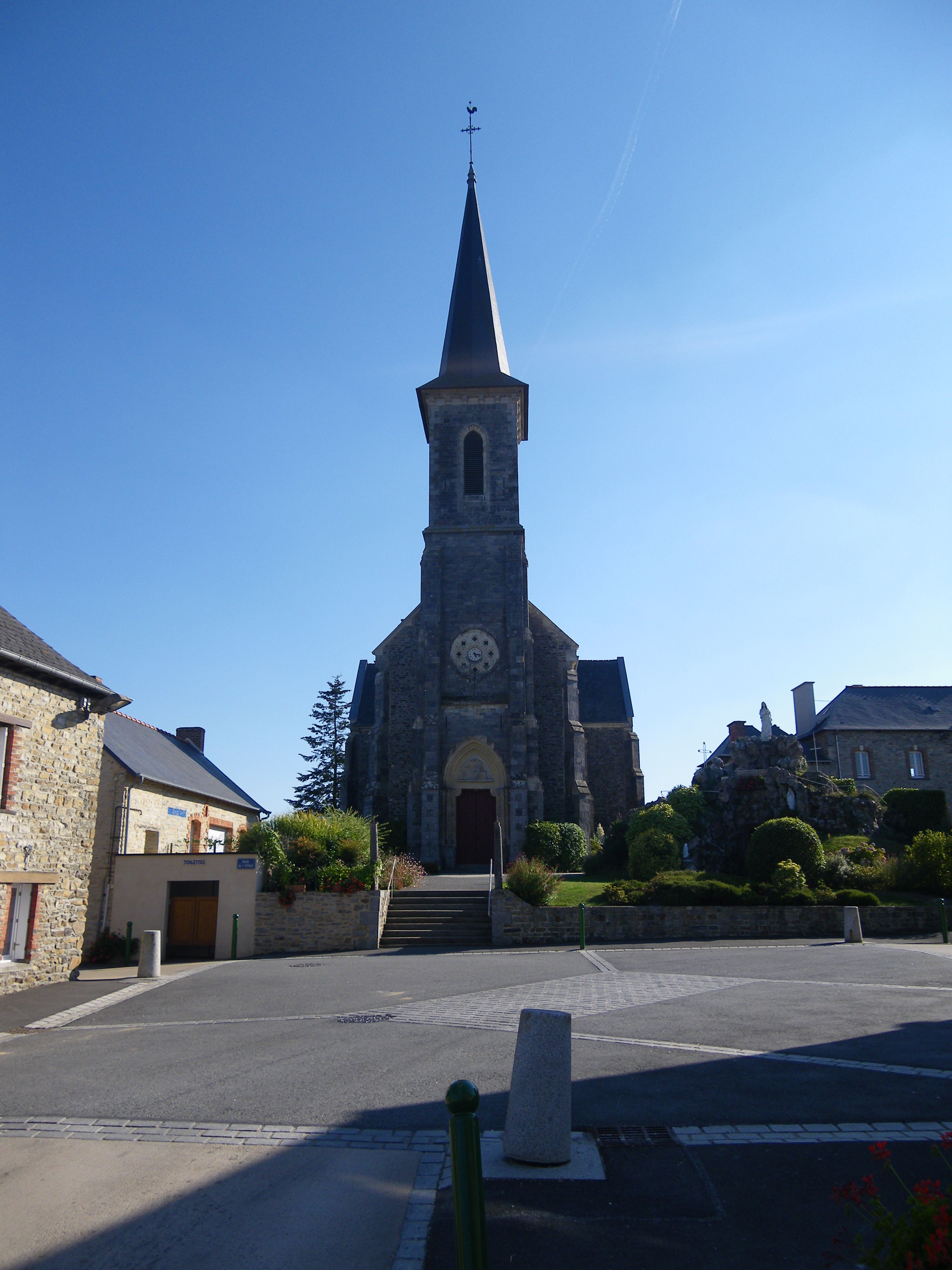 l'eglise de marpiré